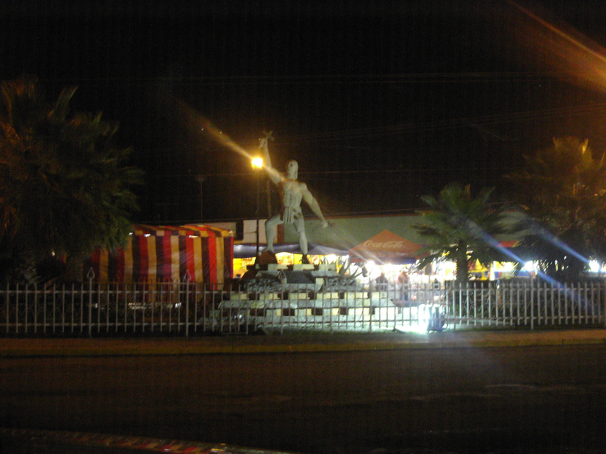 "El Monumento al Indio Chichimeca", de Chichimeca — en San Felipe, Guanajuato, Mexico.